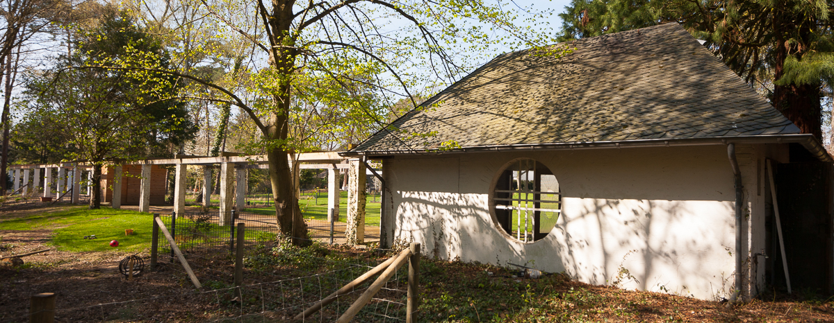 Kiefernweg 12, Bonn: Teehäuschen und Pergola im Park, Ansicht aus Süden